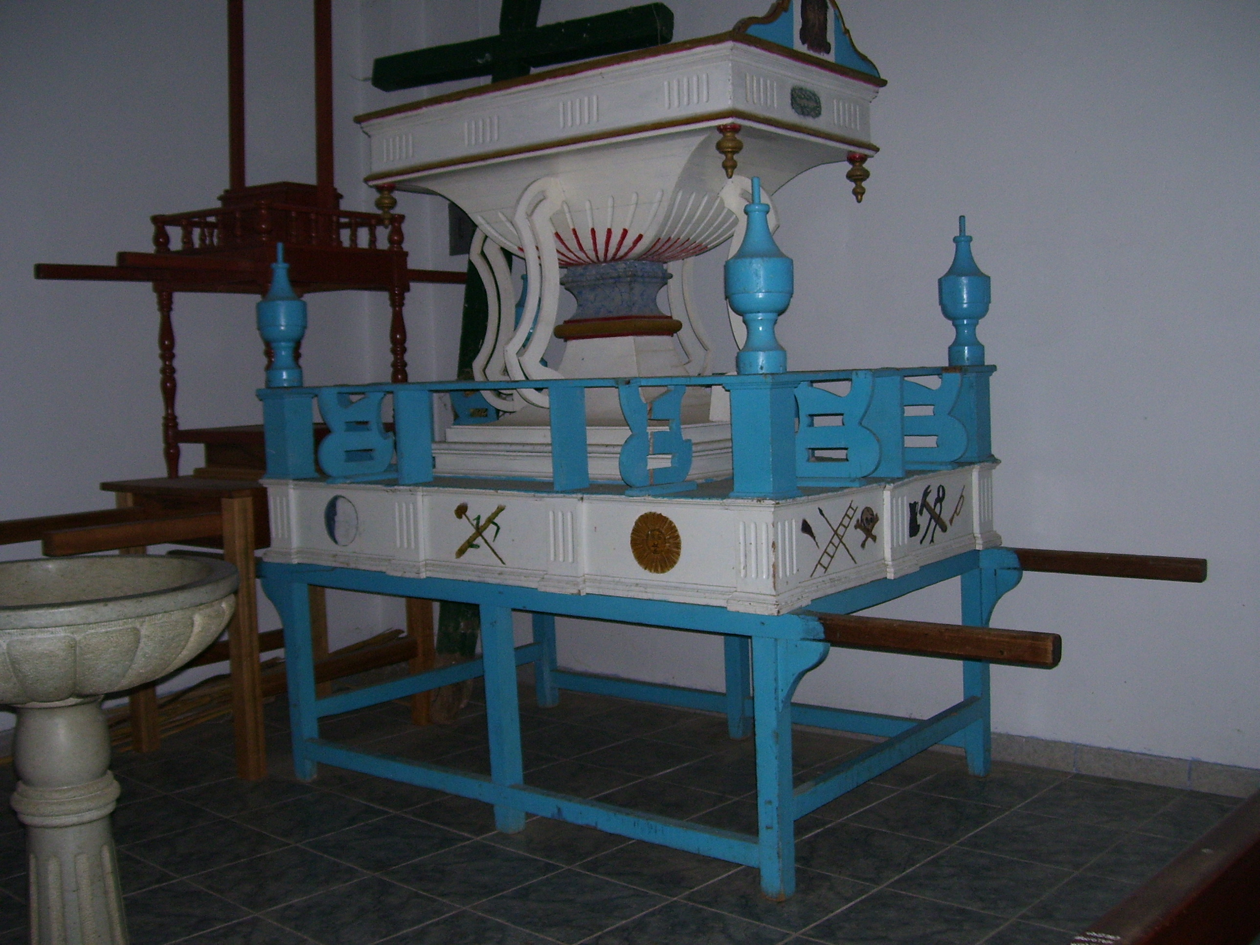 Santo Sepulcro de Ocros. País : Perú Fotógrafo:© Edgar Amador Espinoza Montesinos